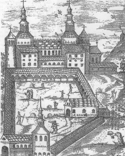 Saint Riquier "abbaye Carolingienne" 3 églises ( dessin de 1672)